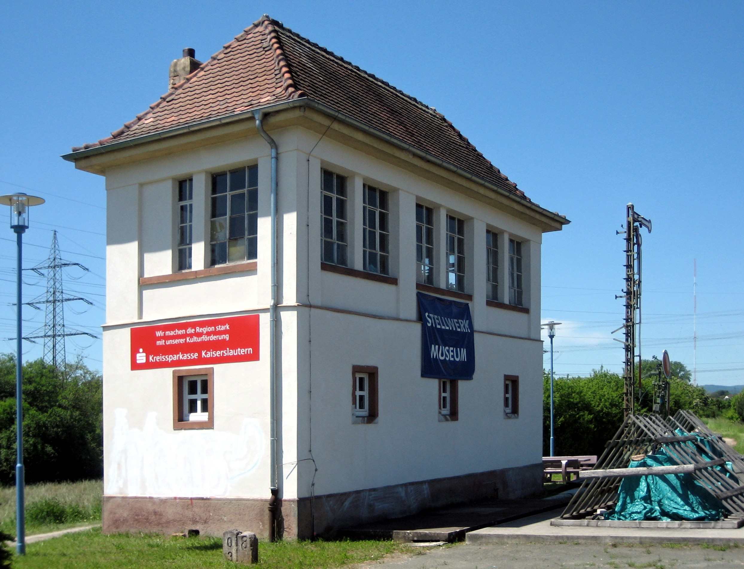 Früheres Stellwerk des Bahnhof Lampertsmühle-Otterbach